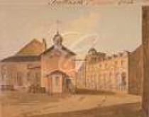 Veduta della Anchor Brewery in Park Street, Southwark, Londra. Acquerello su carta, 1825